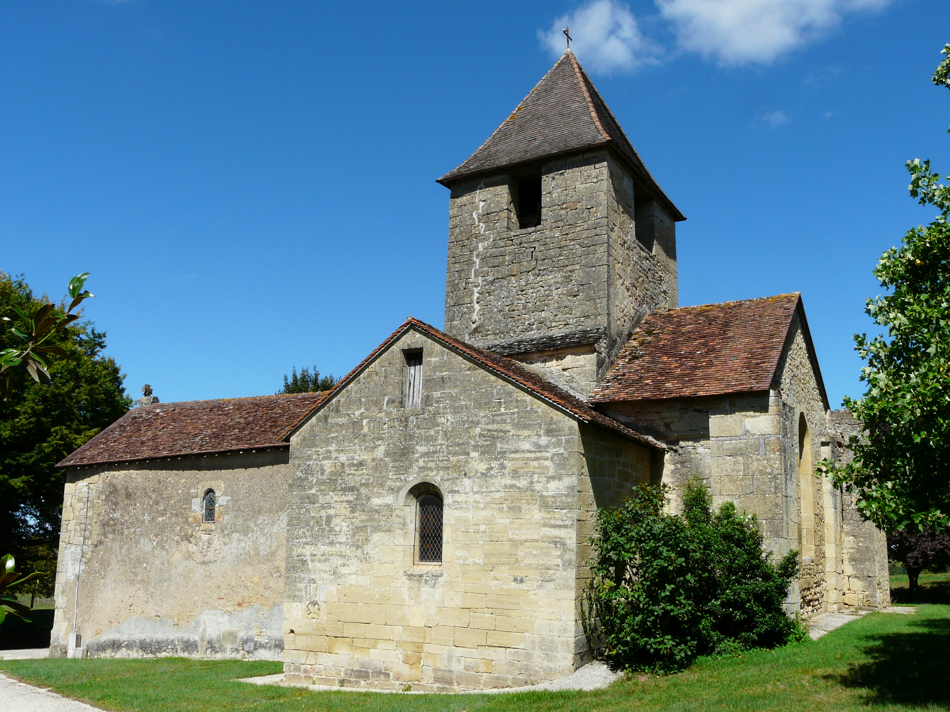 Le côté sud de l'église Sainte-Croix de Nanthiat, Dordogne, France.